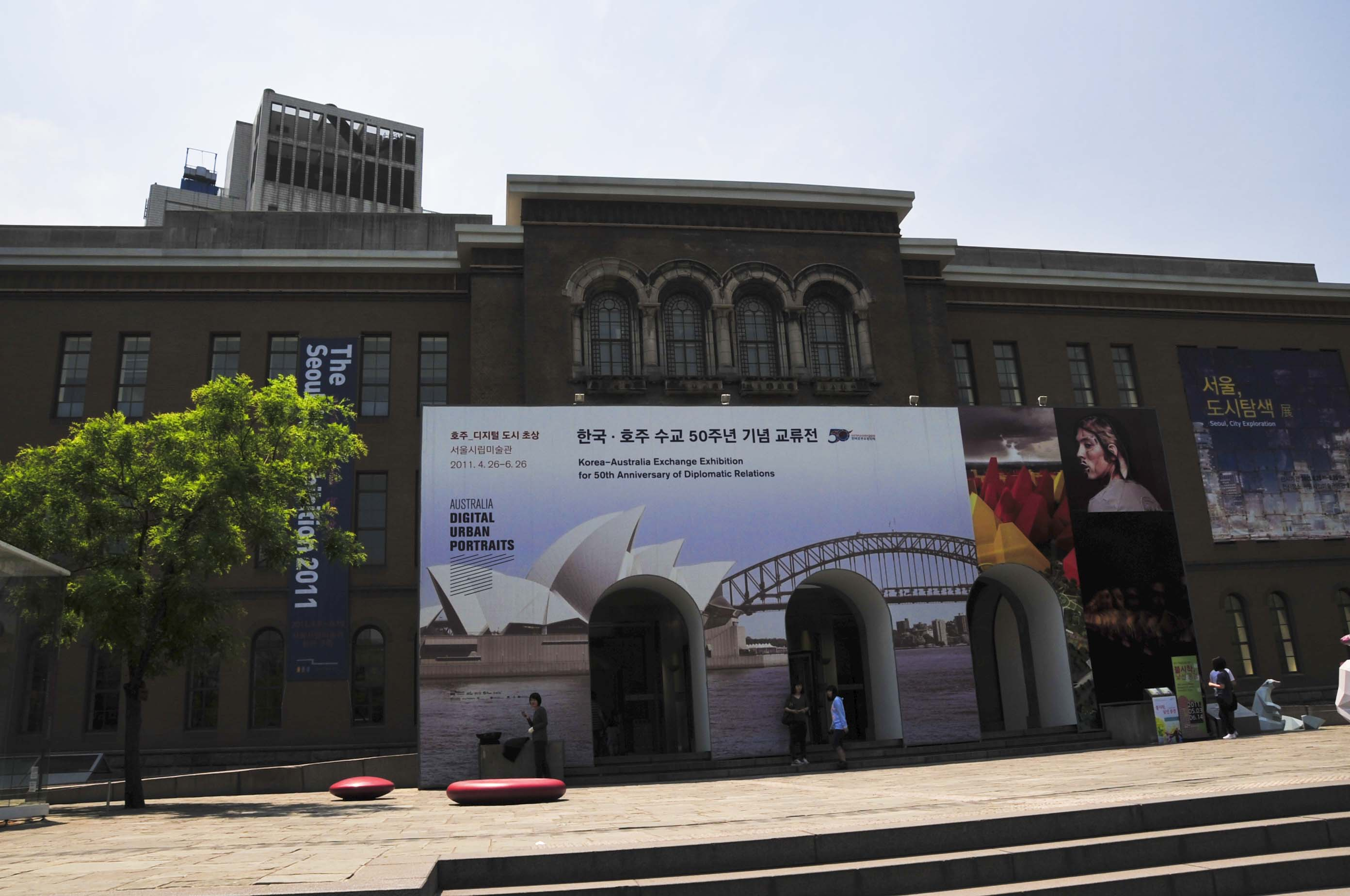 서울시립미술관 서소문 본관